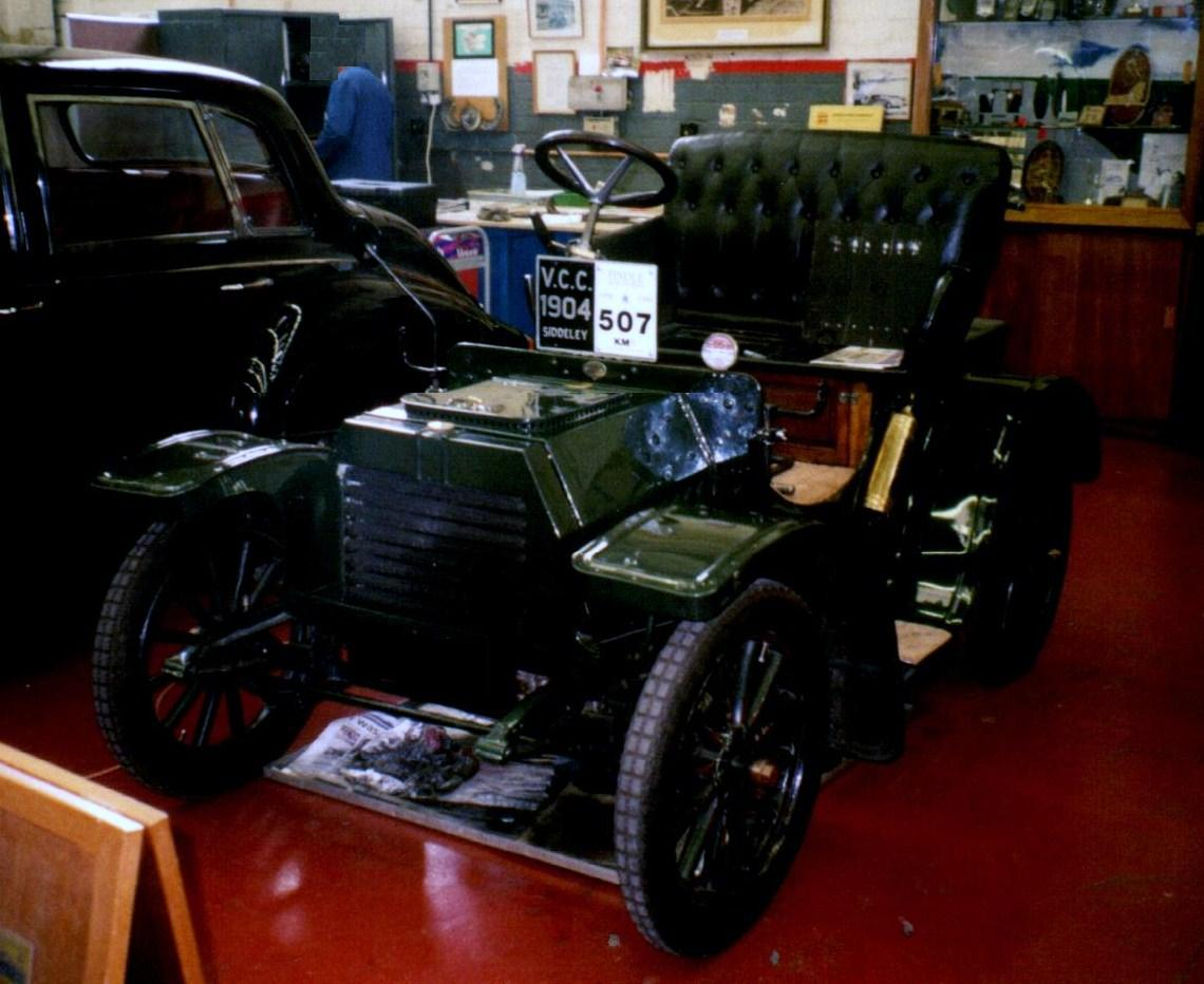 Siddeley 19004